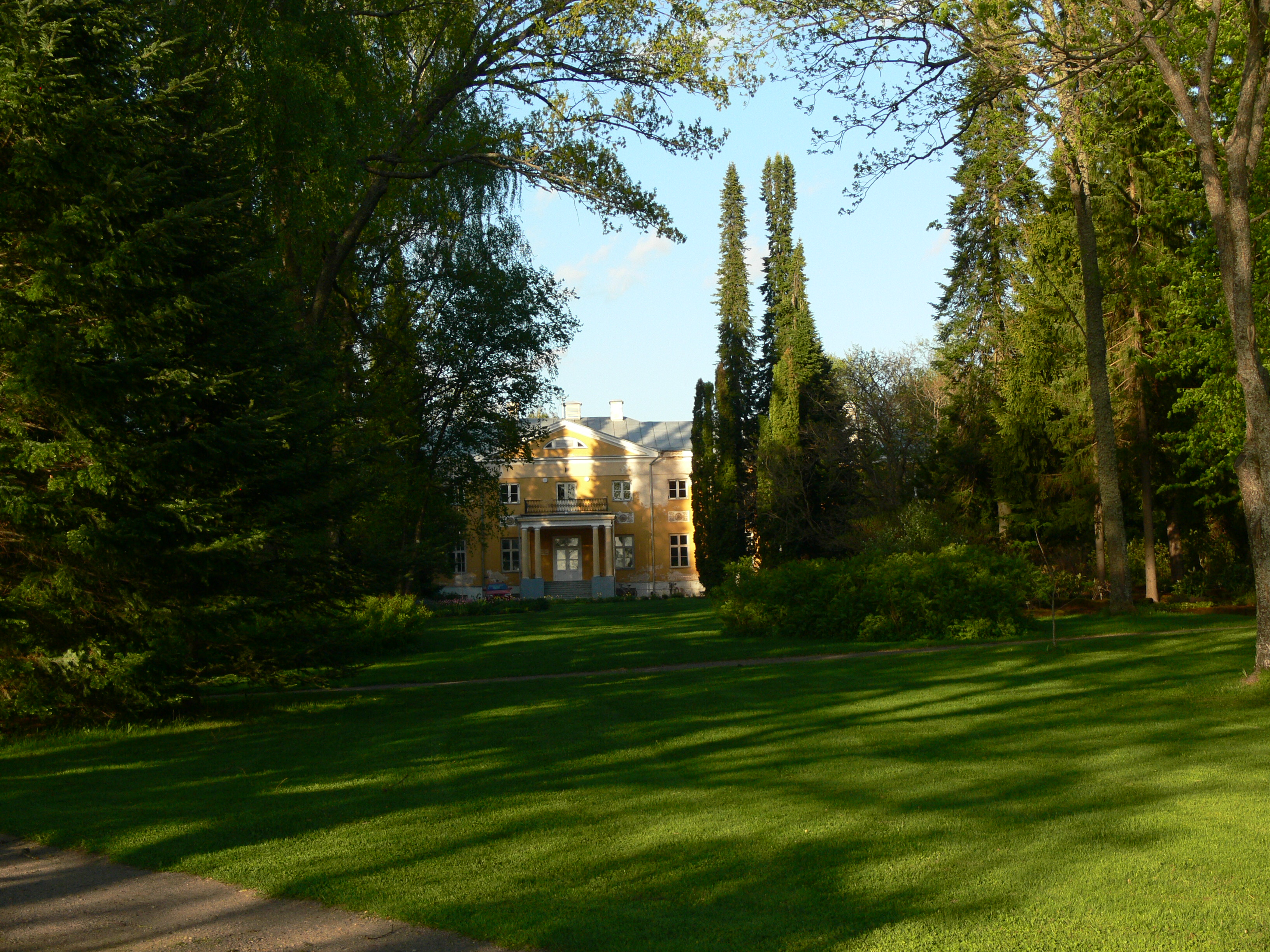 Räpina linn, Põlvamaa